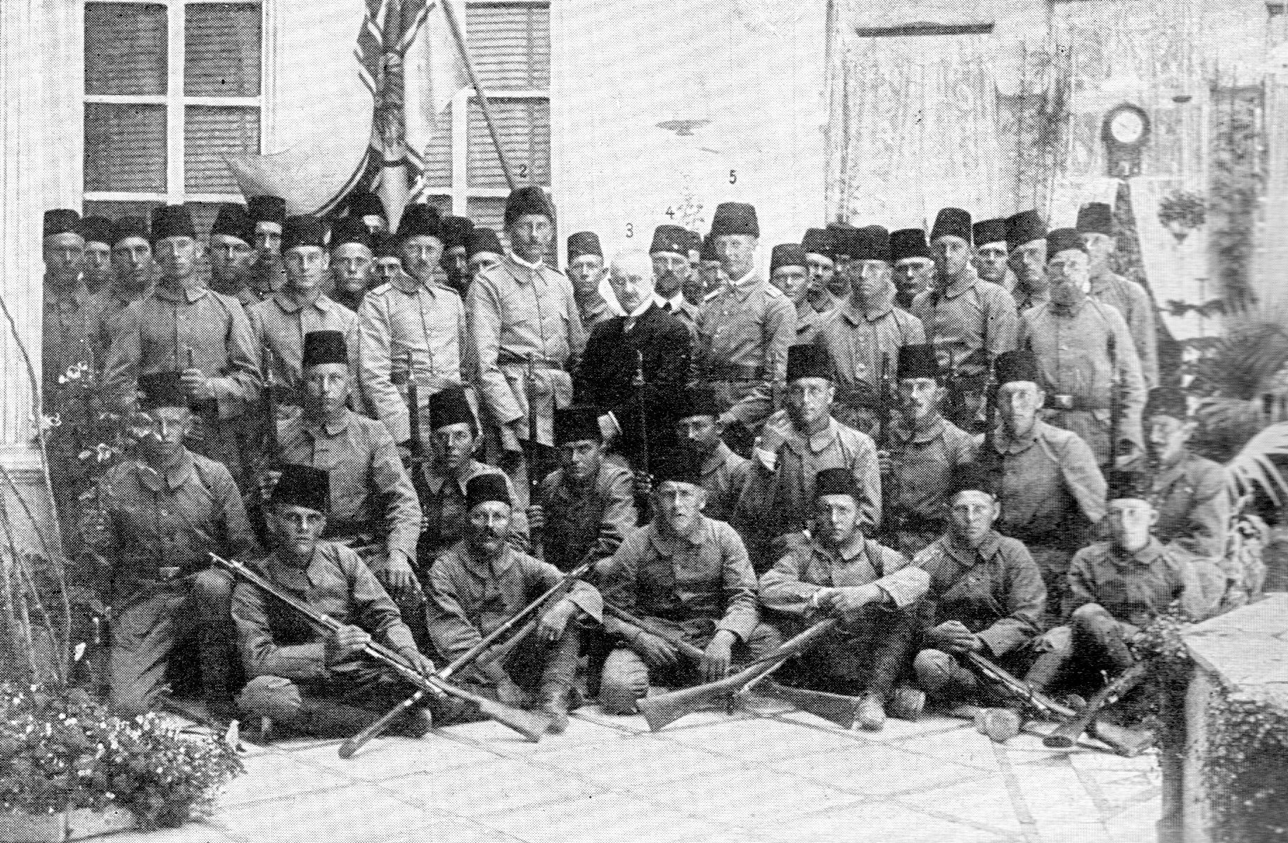 Besatzungsmitglieder von SMS AYESHA im Garten des Kaiserlichen Konsulats in Damaskus 11. Mai 1915. 2) Kapitänleutnant Hellmuth von Mücke 3) Konsul Walter Rößler